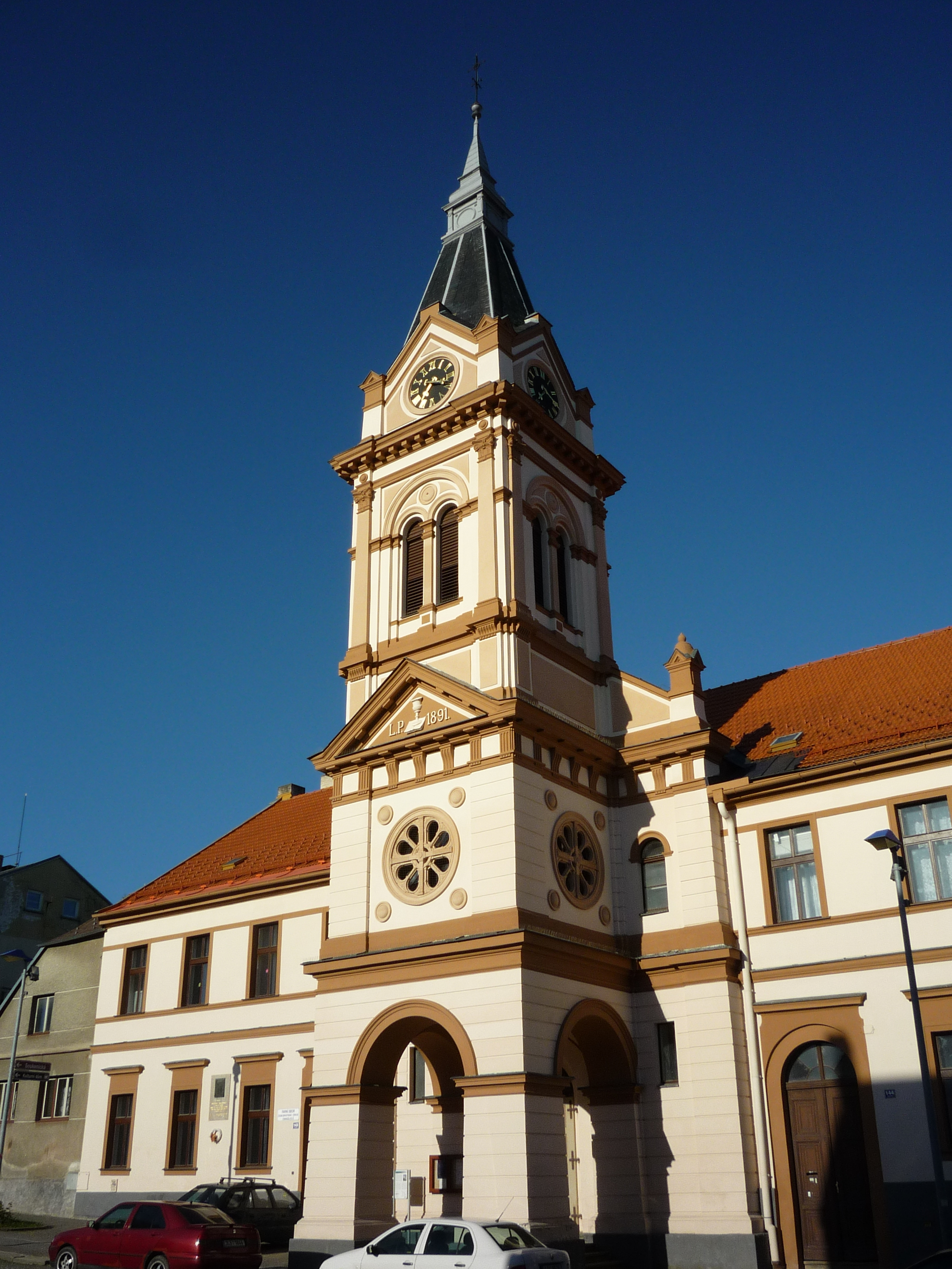 Autor fotografie Jiří Zelenka. Evangelický kostel - chráněná kulturní památka České republiky. Husova ulice. Humpolec. Okr. Pelhřimov. Kraj Vysočina. Czech Republik.